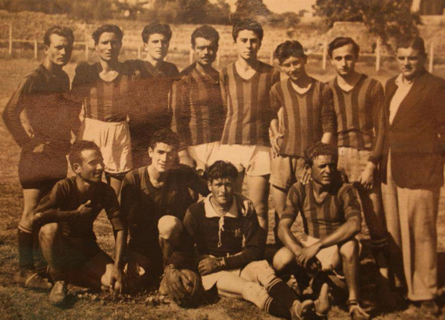 Formazione del Tuscania calcio nella stagione 1950-1951